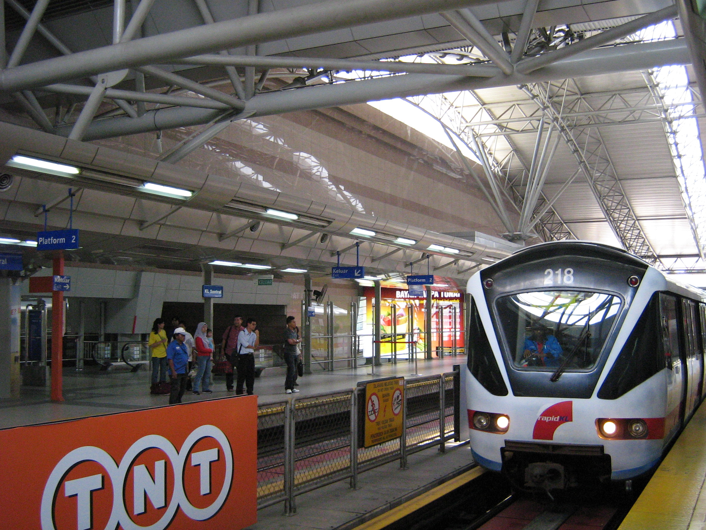 kelana jaya line station at KL sentral